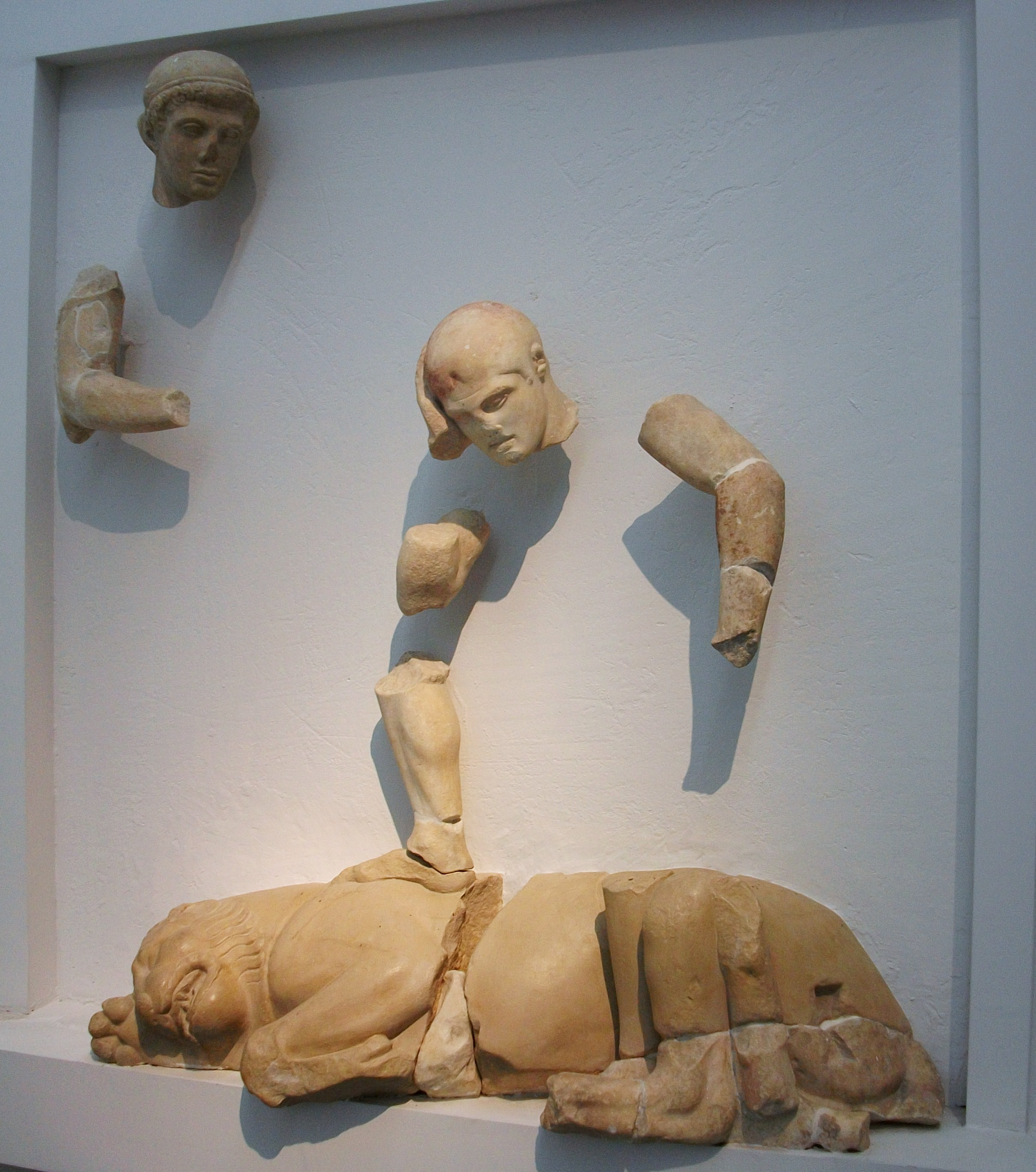 Mètopa del temple de Zeus d'Olímpia amb representació d'Hèracles i el lleó de Nemea (Museu Arqueològic d'Olímpia).